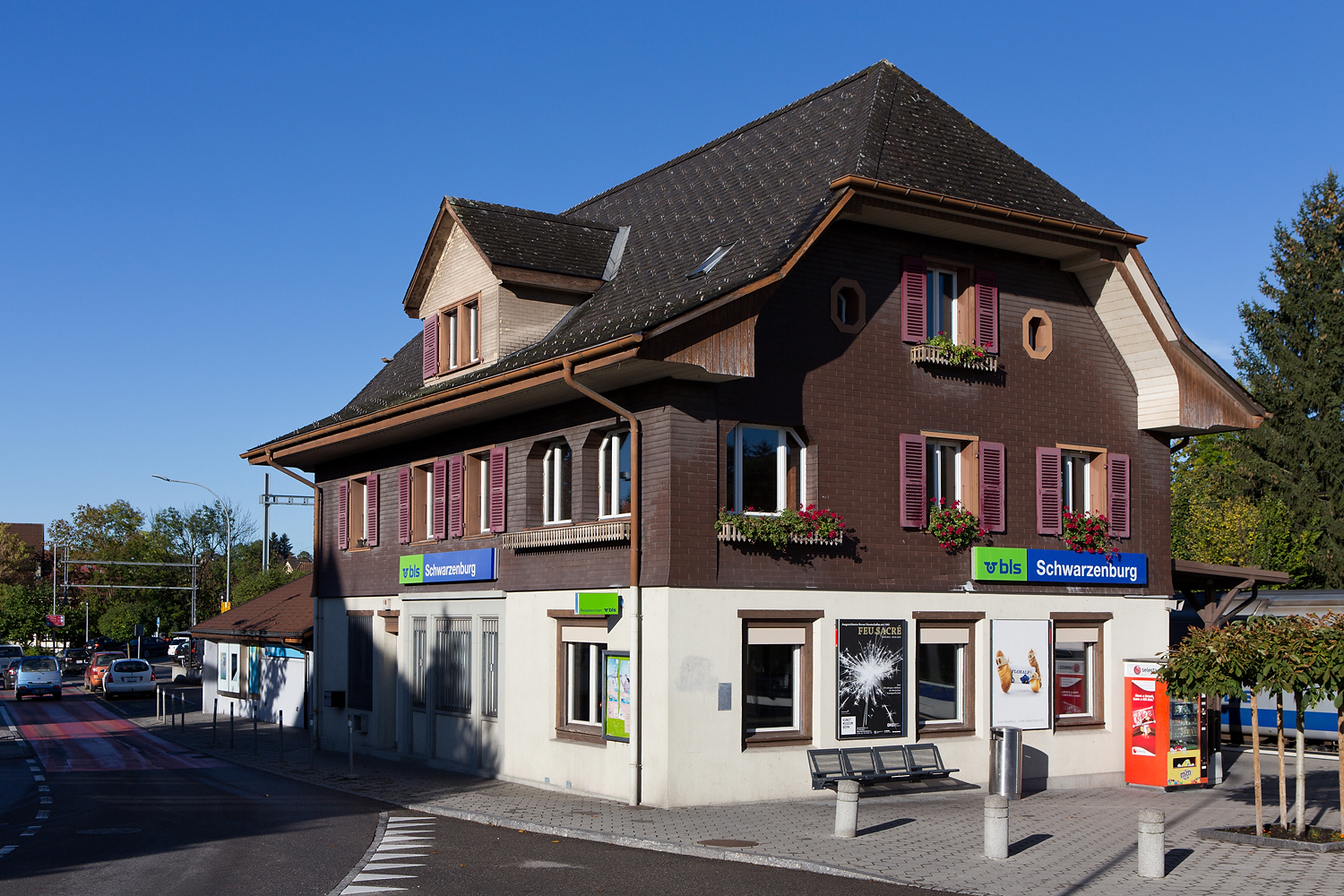 Bahnhof der BLS in Schwarzenburg (BE)